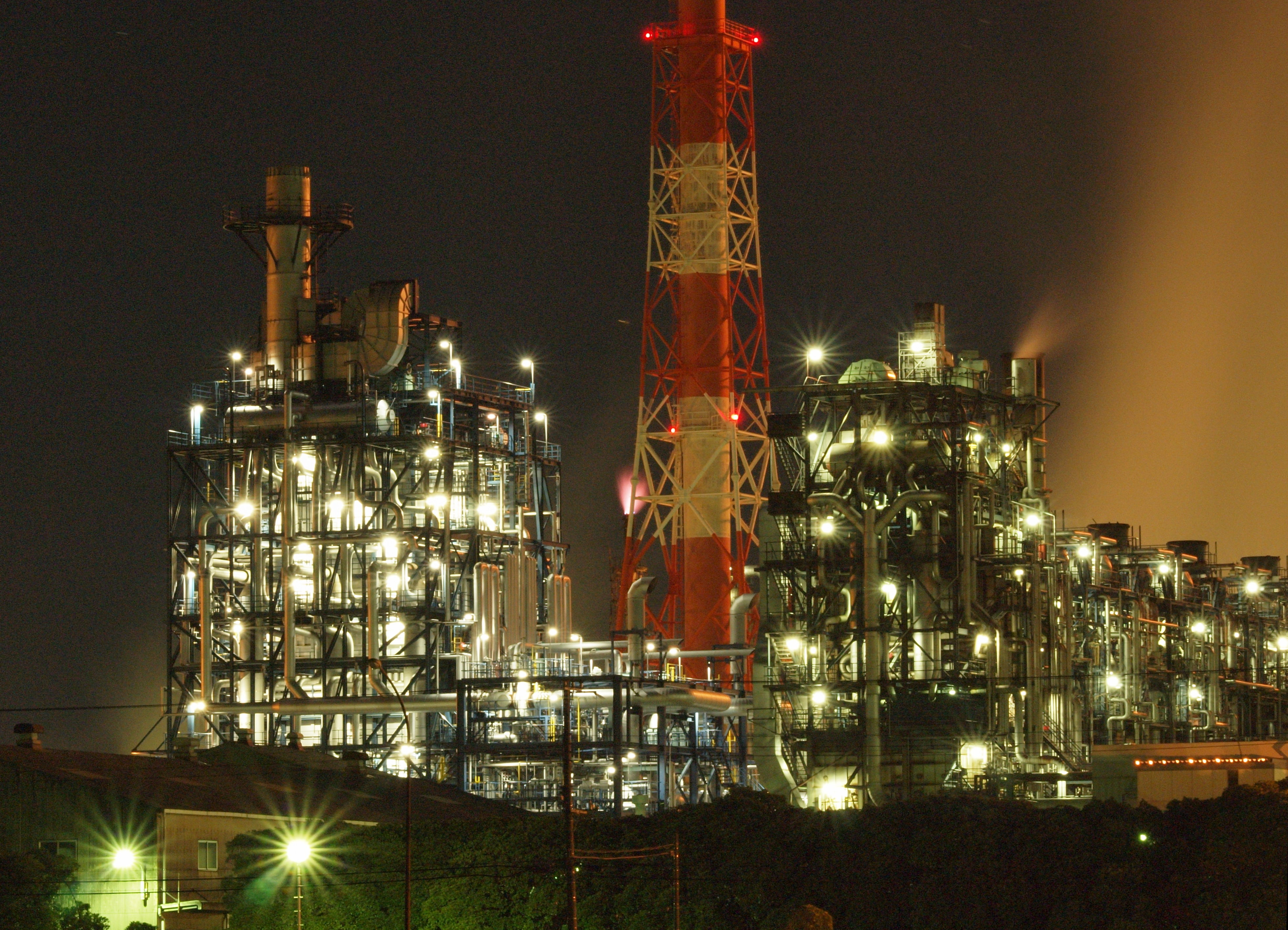 Goi , Chiba